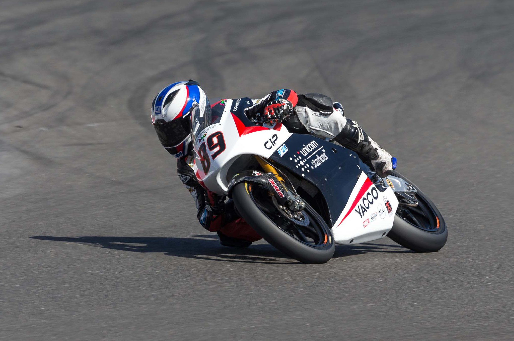 2013 Hertz British Grand Prix - Moto3 - #89 Alan Techer